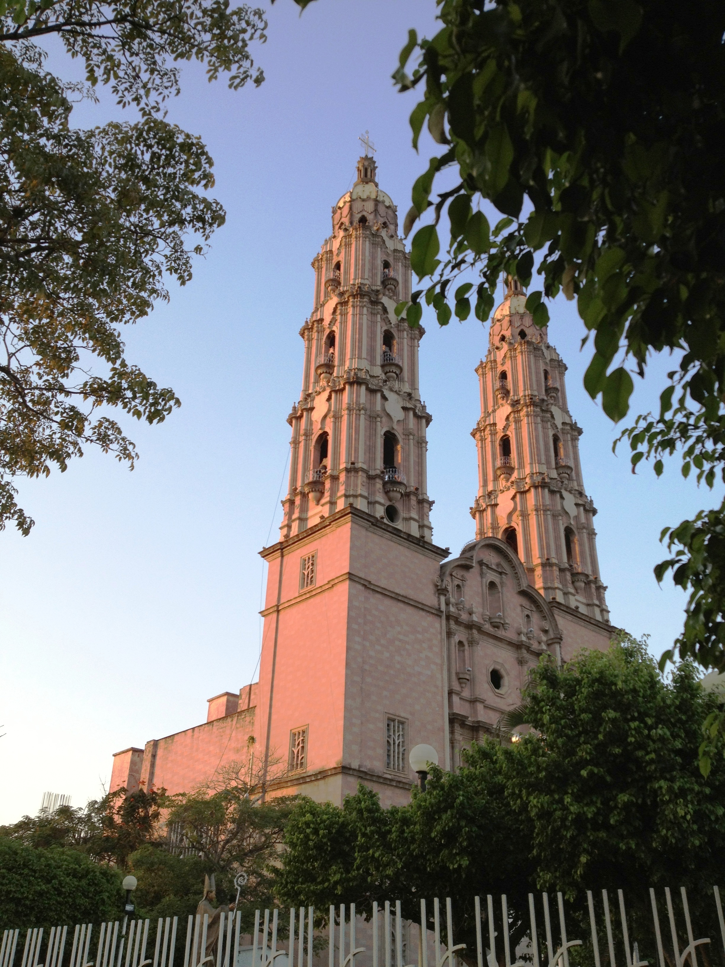 Catedral de Villahermosa al atardecer